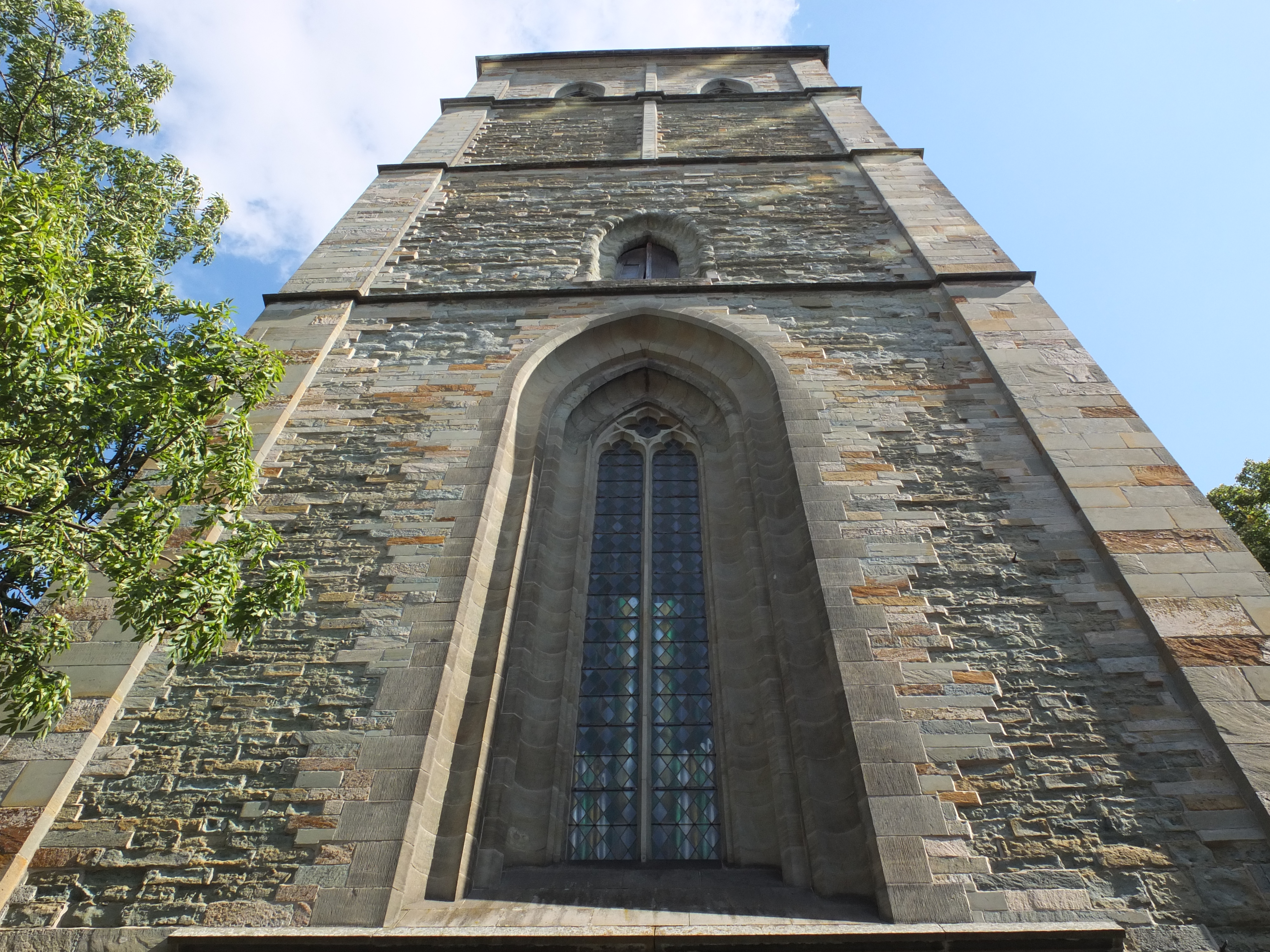 Turm der St.-Pauli-Kirche in SoestThis is a photograph of an architectural monument.It is on the list of cultural monuments of Soest